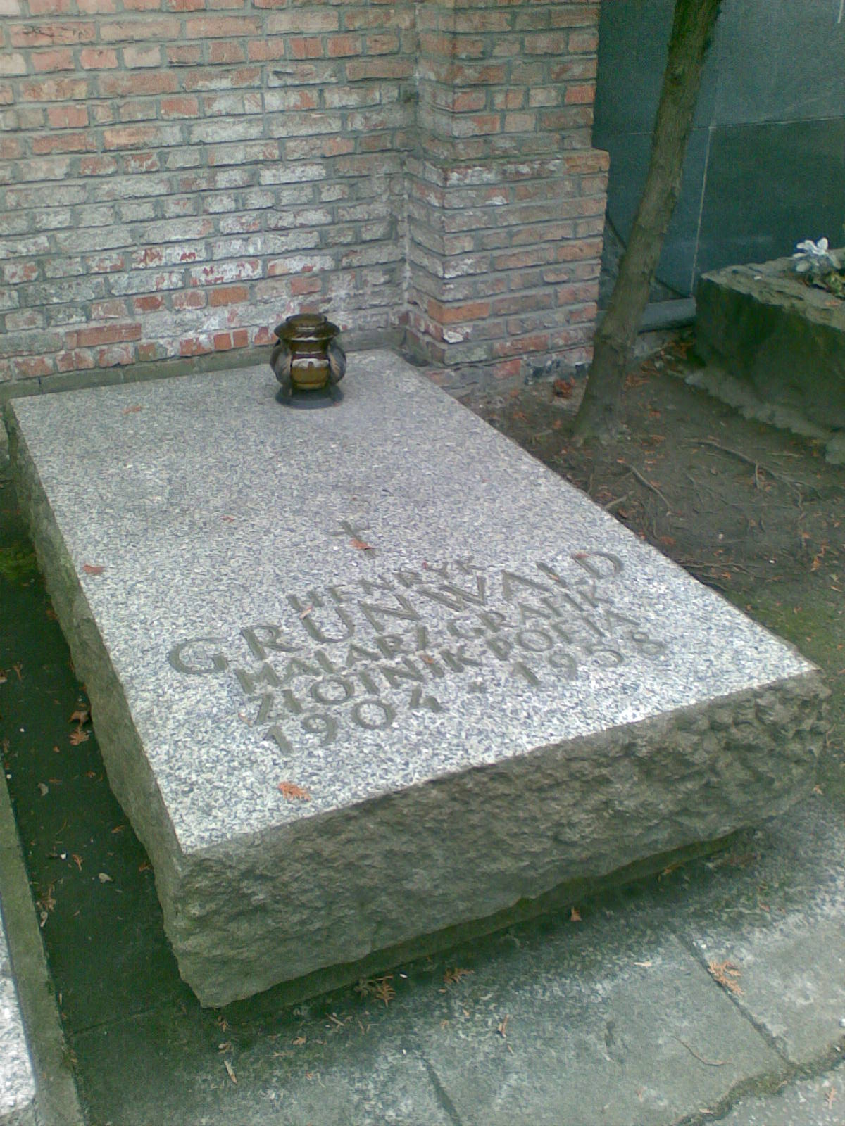 Grób Henryka Grunwalda - Cmentarz Powązkowski, aleja zasłużonych